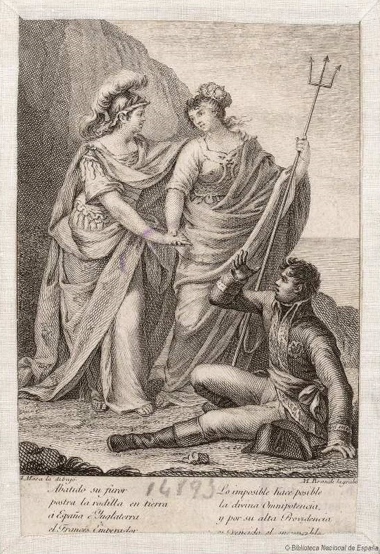 Alegoría de España e Inglaterra vencedoras de Napoleón, grabado calcográfico, Madrid, Biblioteca Nacional de España